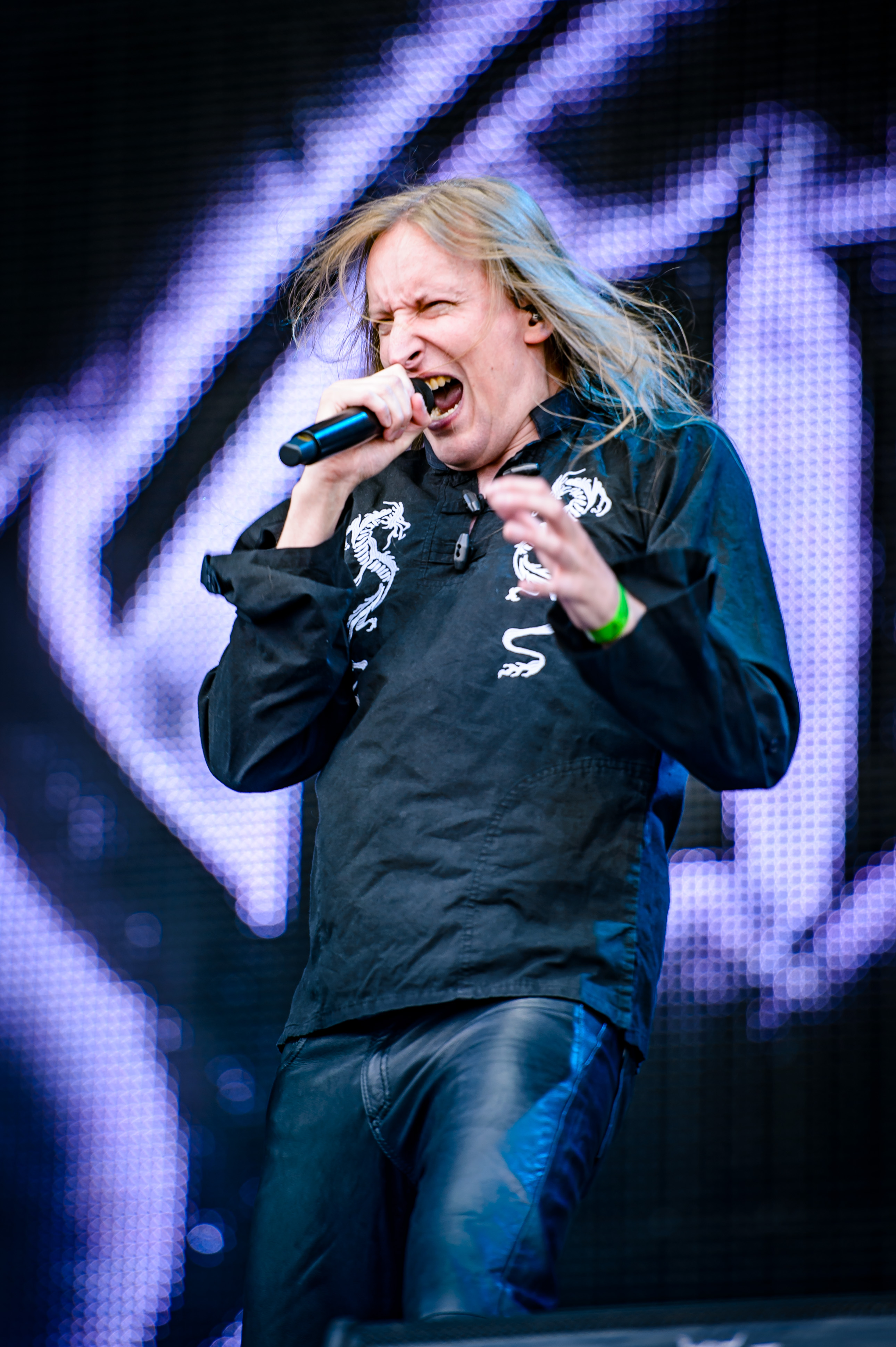 'Wacken Open Air 2018': 'Wintersun'